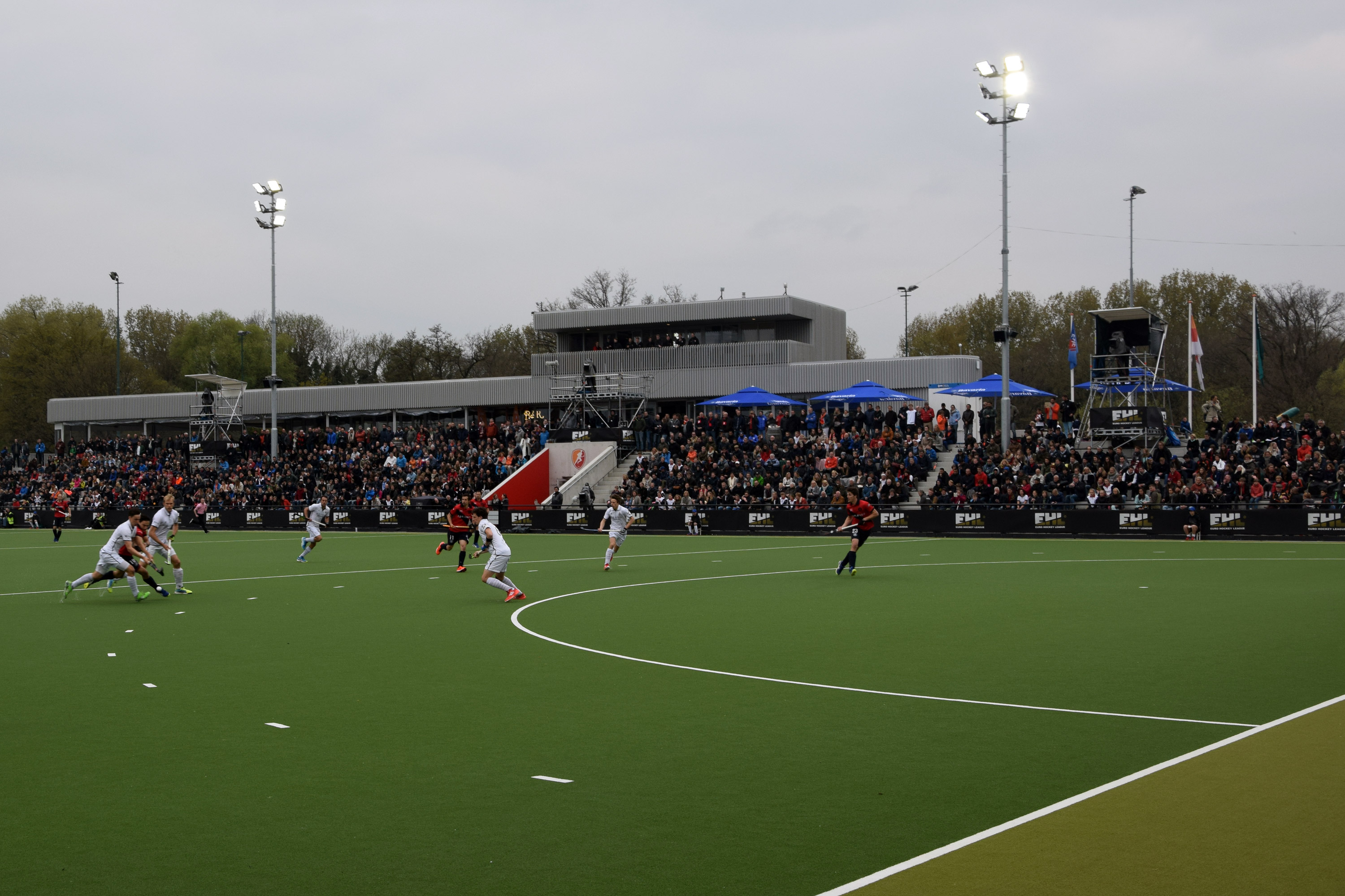 Tribüne und Clubhaus des HC Oranje-Rood